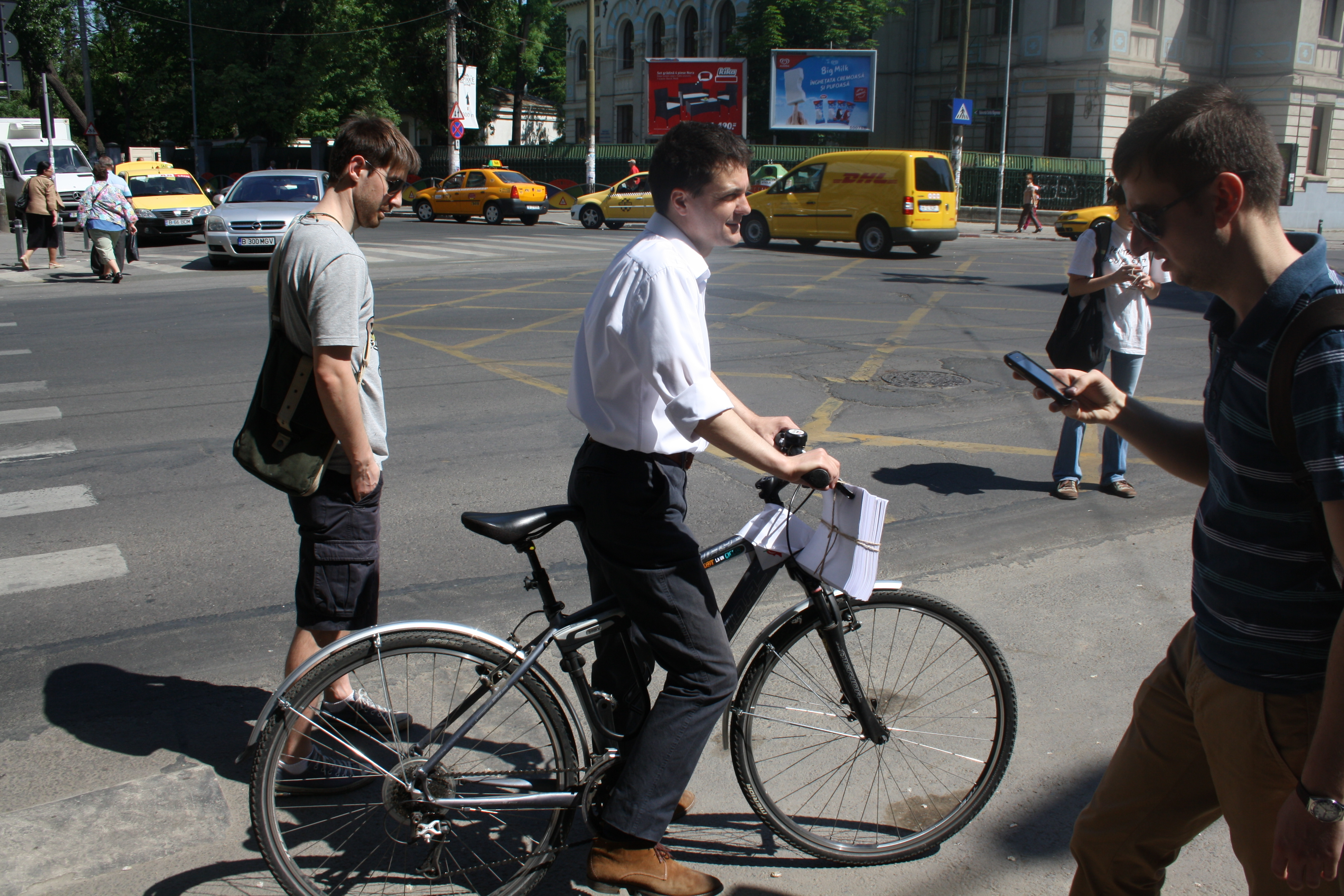 Nicușor Dan